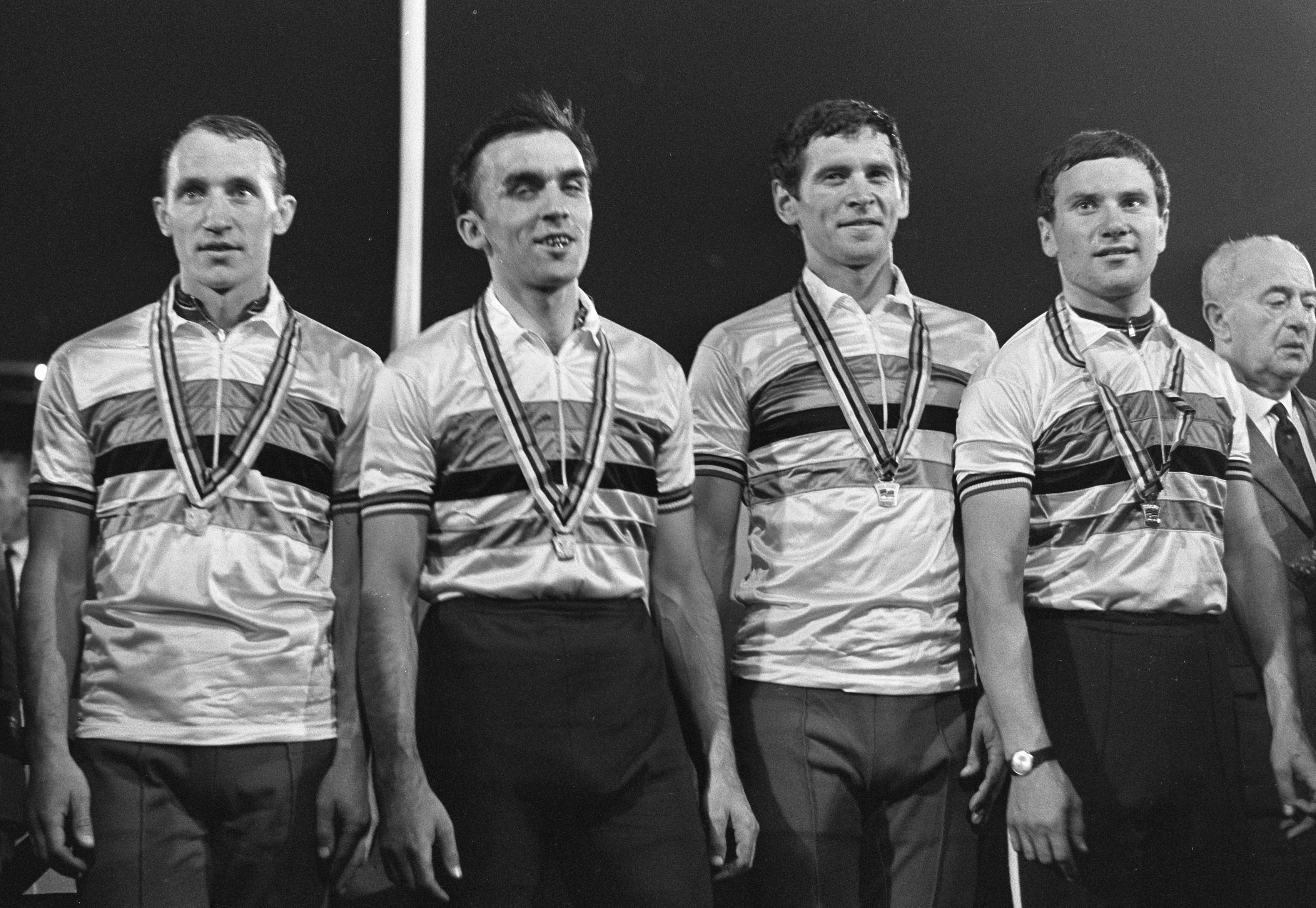 WK Wielrennen op de baan. De Russische ploeg op podium